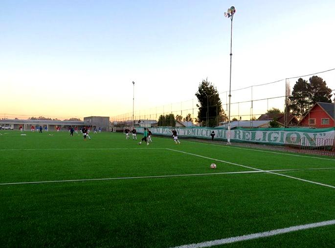 Deportes Temuco entrenando en Complejo Deportivo M11